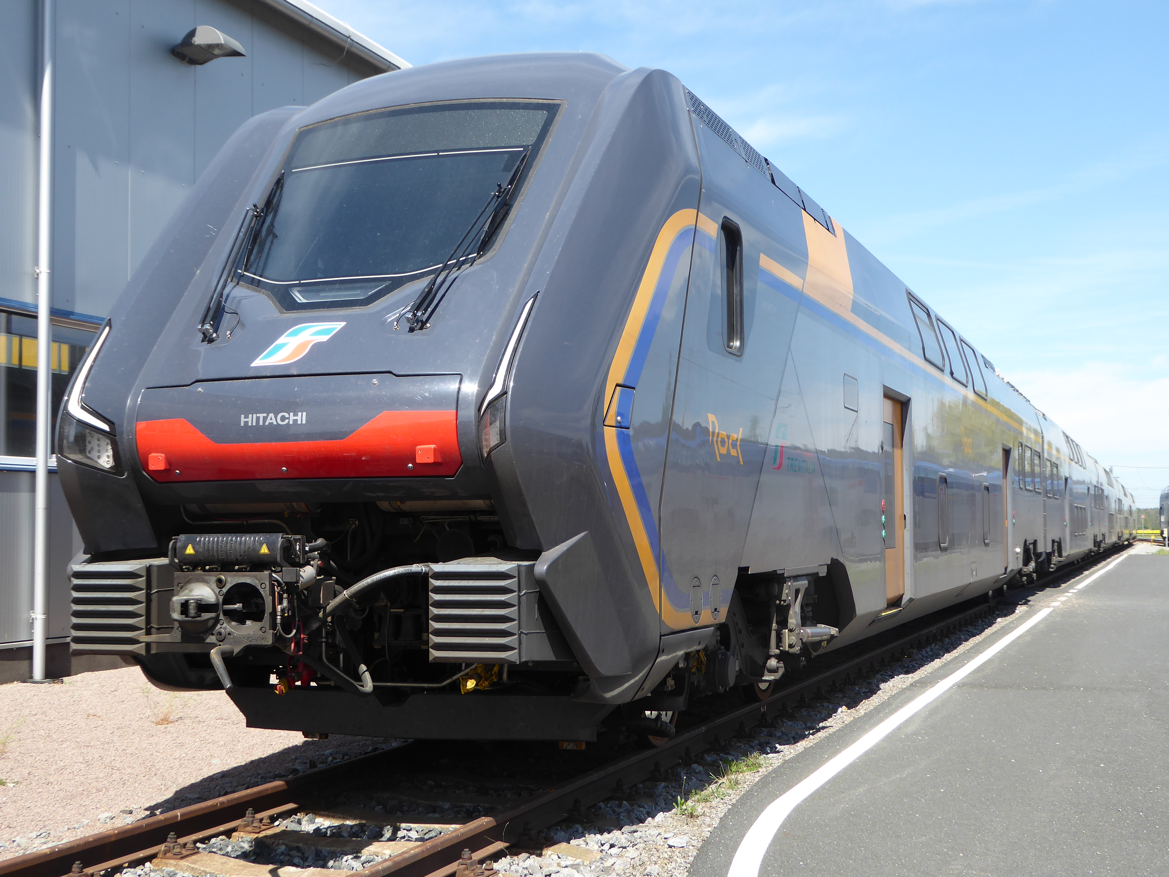 Trenitalia Hitachi Caravaggio auf dem Eisenbahnversuchsring Velim (CZ)